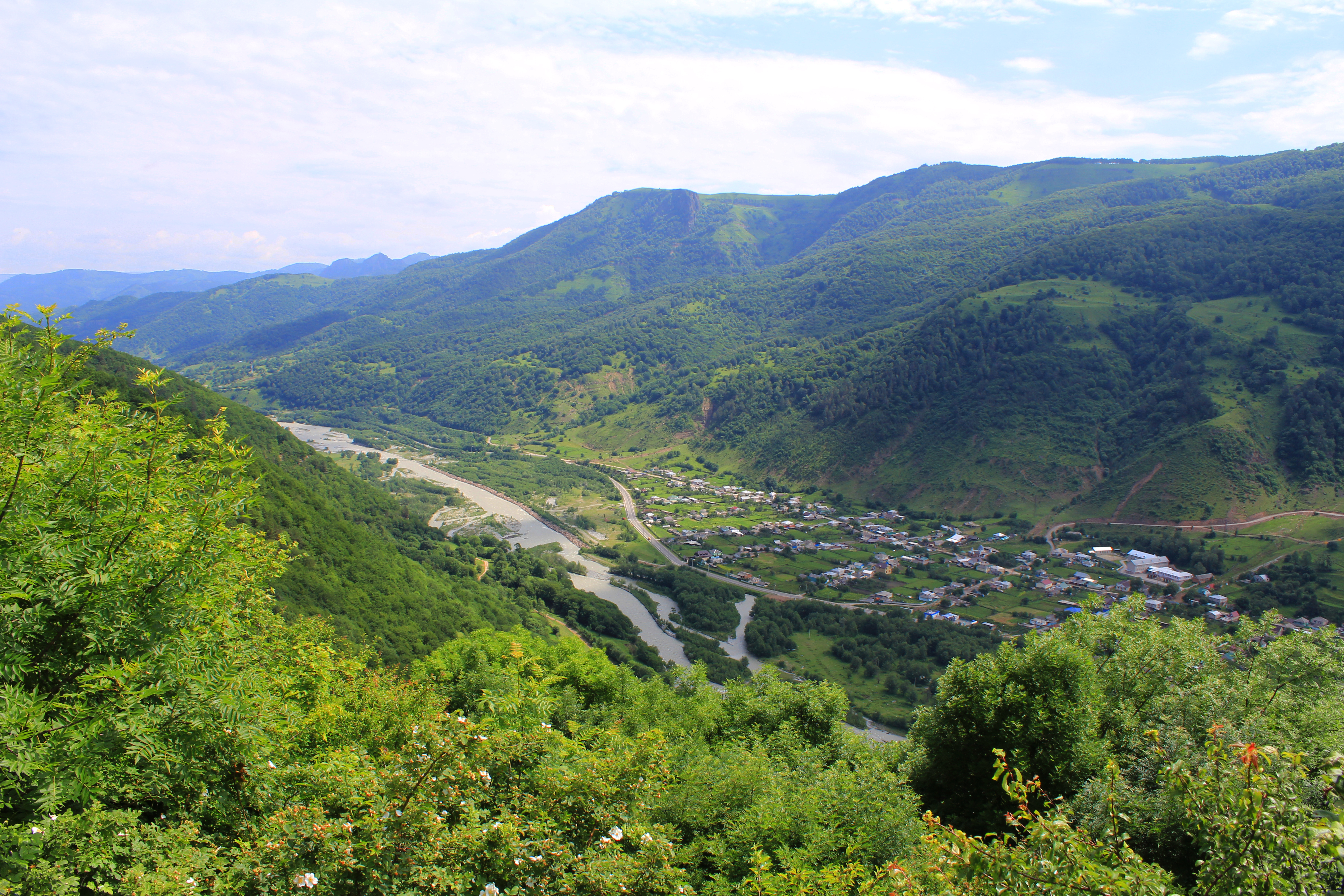 Теберда: Карачаевск, Карачаево-Черкесия This image is related to the protected area of Russia number 0900023